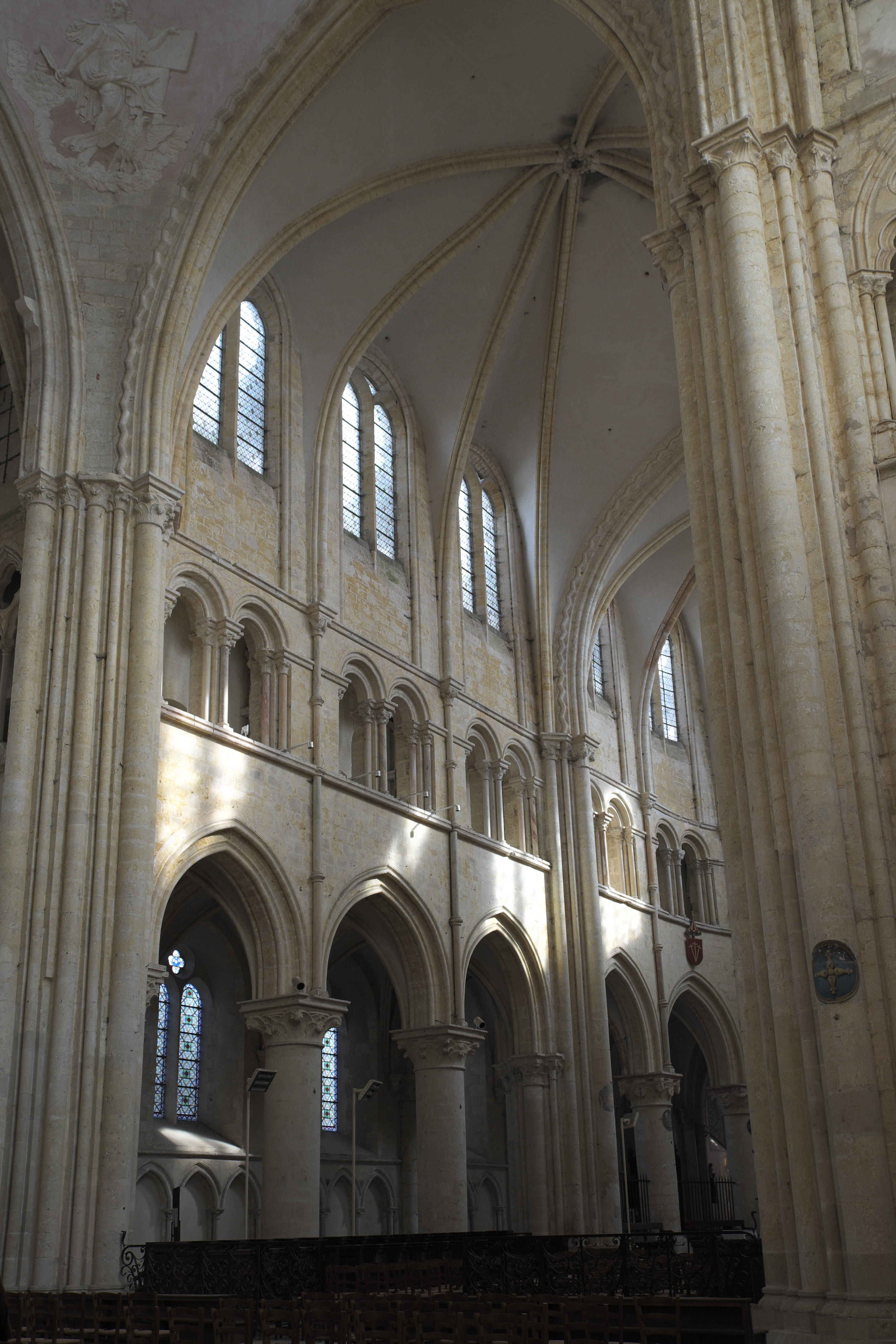 Stiftskirche Saint-Quiriace in Provins im Département Seine-et-Marne (Île-de-France/Frankreich), Chor